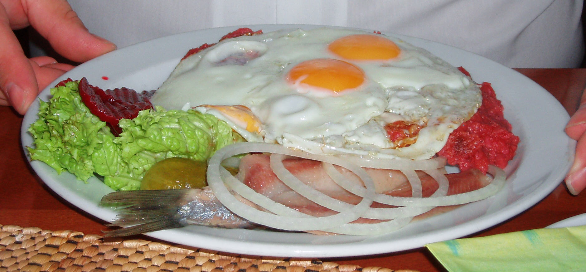 Labskaus, Spiegeleier und Fisch